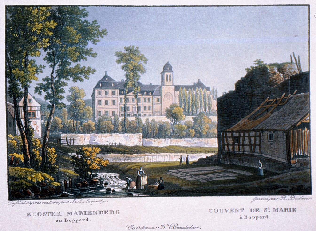 Altkolorierter Aquatintastich von R.Bodmer nach Vorlage von J.A.Lasinsky